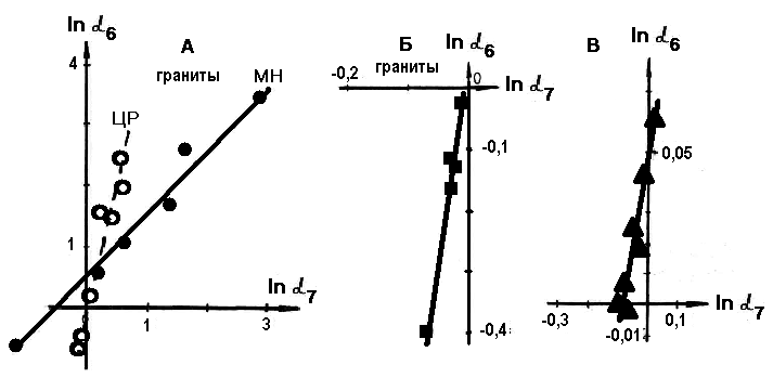 Результаты кислотного выщелачивания изотопов Pb: А- циркон (ЦР) и монацит (МН) из гранитов. Б- из микроклина и плагиоклаза гранитов. βi = (iPb/204Pb)мн/(iPb/204Pb)рр, мн-минерал, рр-раствор. Г- фракционирование изотопов свинца между гранитом и акцессорным галенитом Забайкалбя. βi = (iPb/204Pb)гр/(iPb/204Pb)гн; гр-гранит, гн- галенит